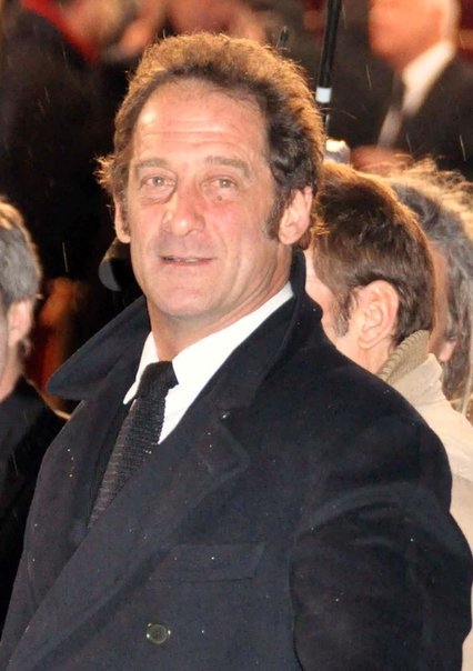 Vincent Lindon à la cérémonie des Césars 2010.